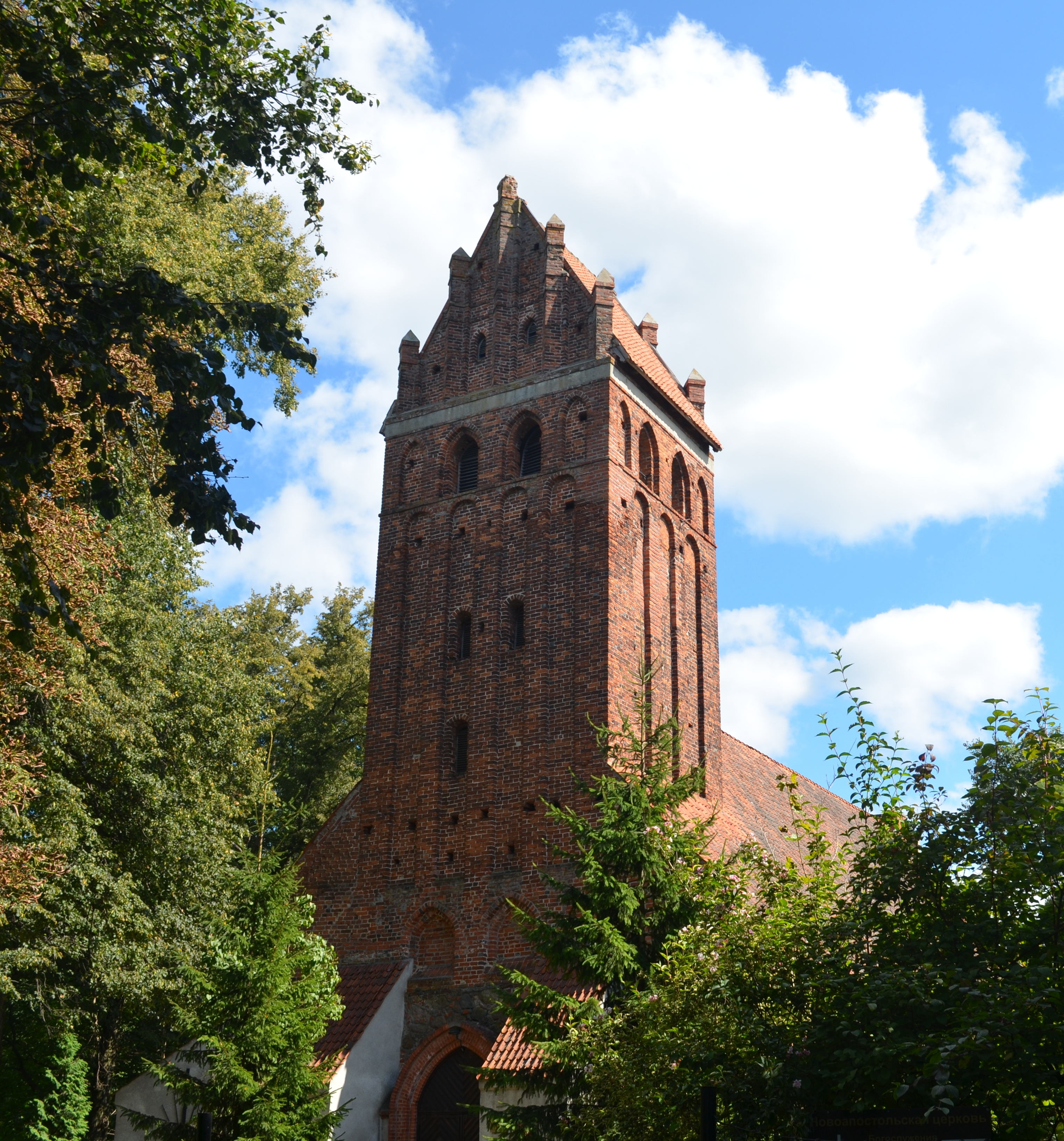 Приходская церковь (Калиниградская область, Гурьевск, город гурьевск, заречная улица, 5)